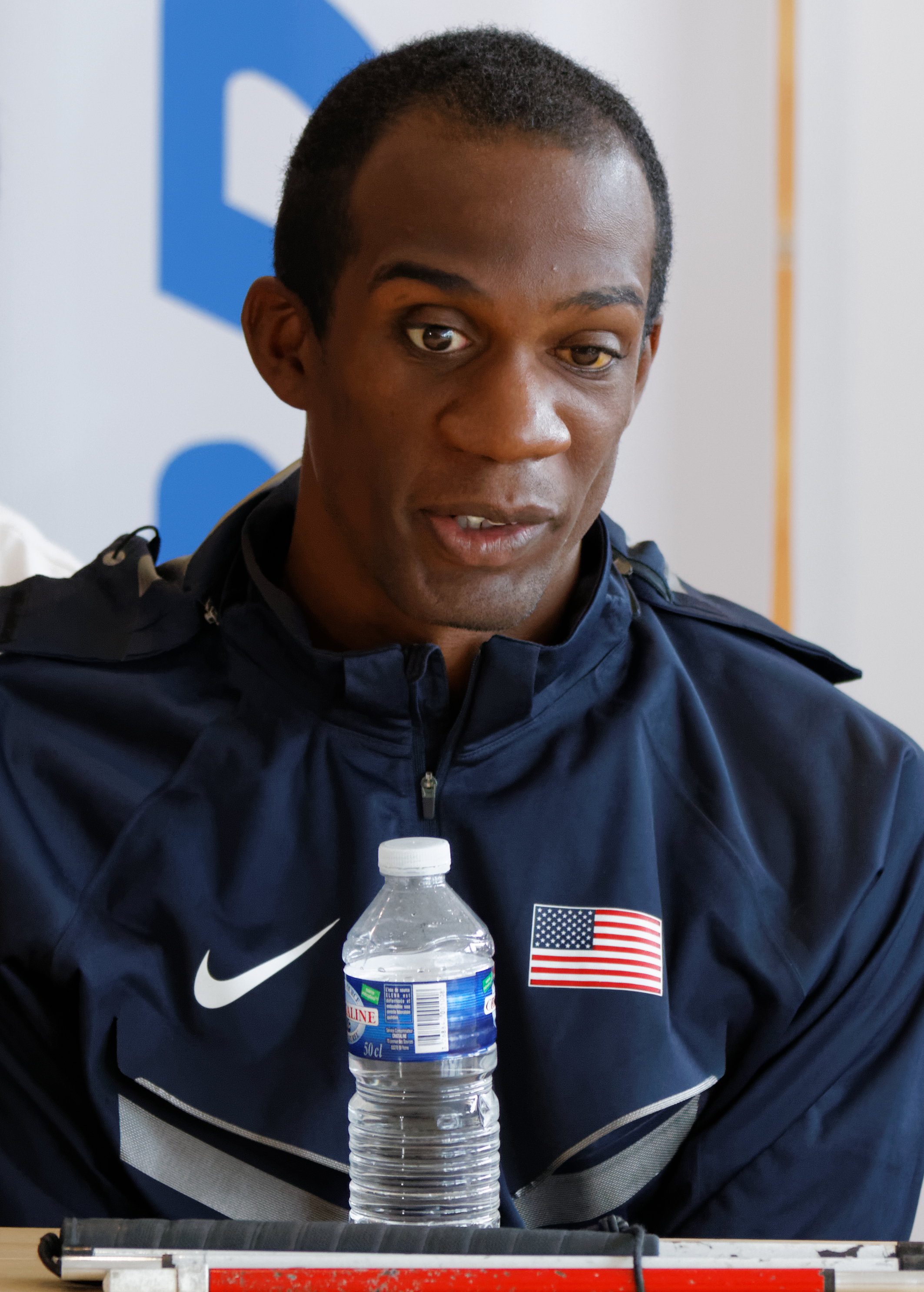 Lex Gillette lors de la conférence de presse du meeting international d'athlétisme Paris Ile-de-France, 4 juin 2014